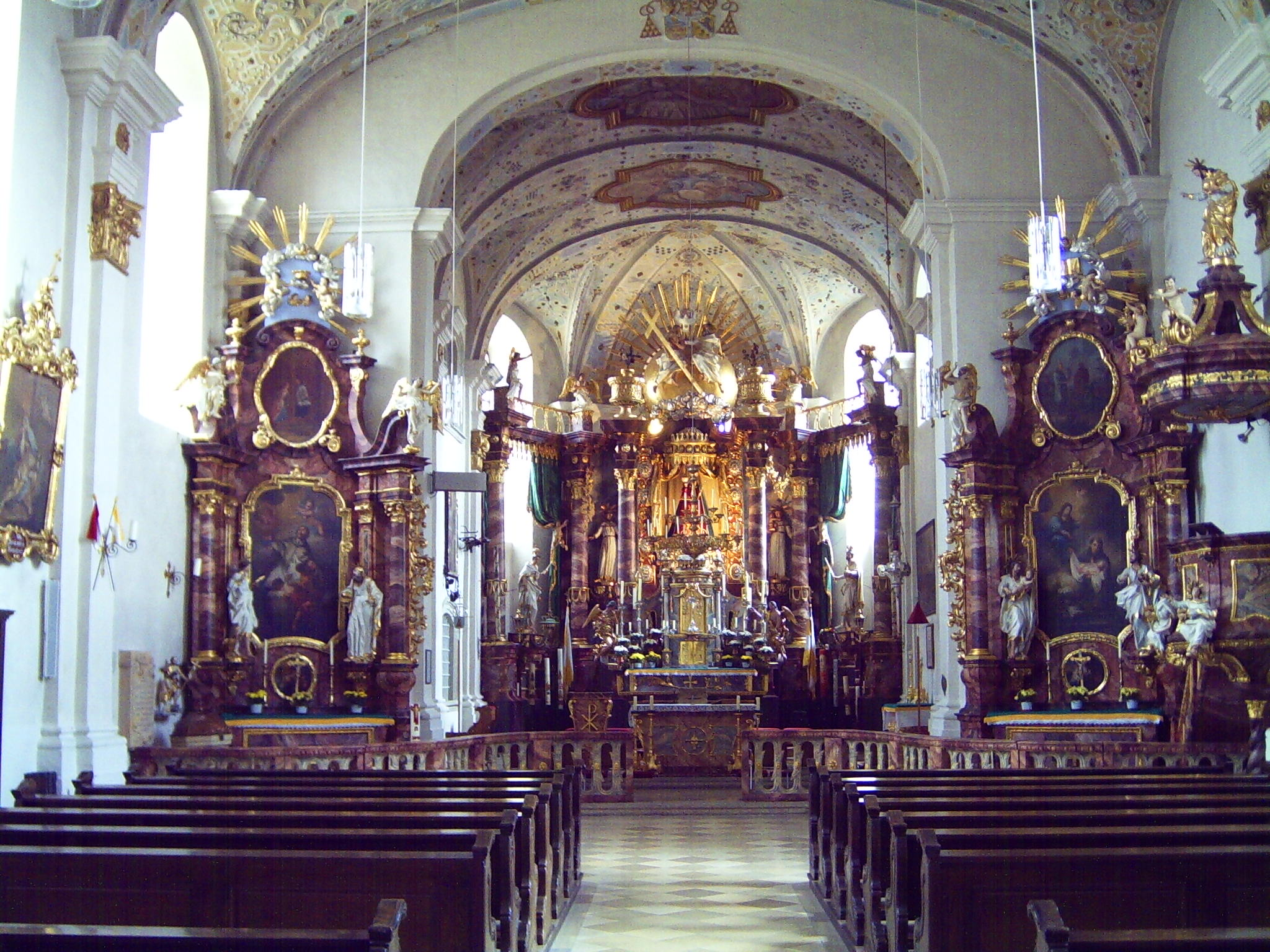 Innenansicht der Basilika